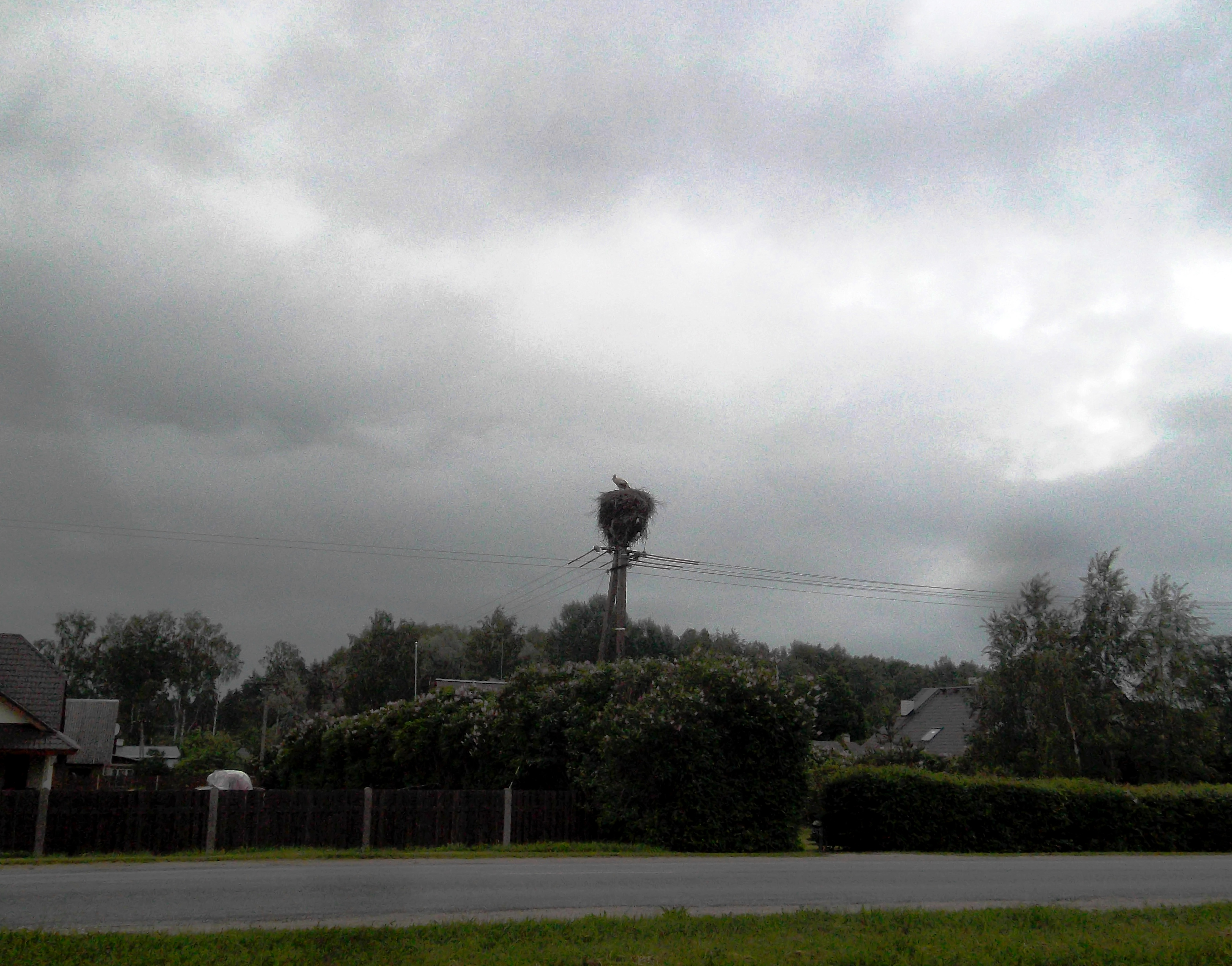 Аист в деревне Пукамяэ